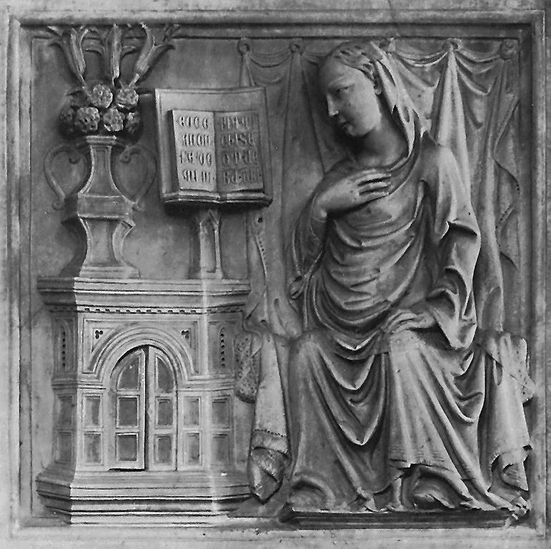 Giovanni di Balduccio - Annunciazione - Chiesa di Santa Maria del Prato (San Casciano Val di Pesa)